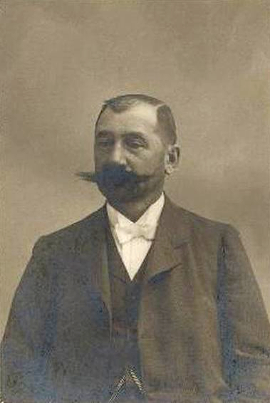 Lukács László (1850-1932) kereskedelemügyi miniszter